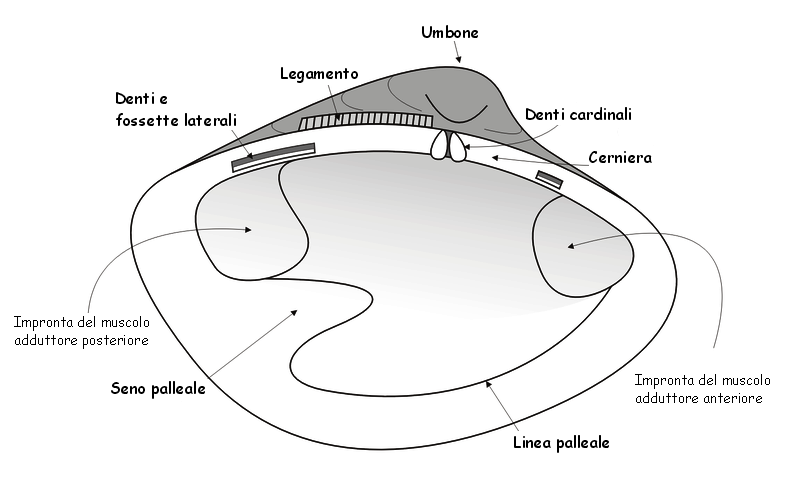 Tremaux, rielaborazione immagine Commons, valva di Mollusco Lamellibranchio